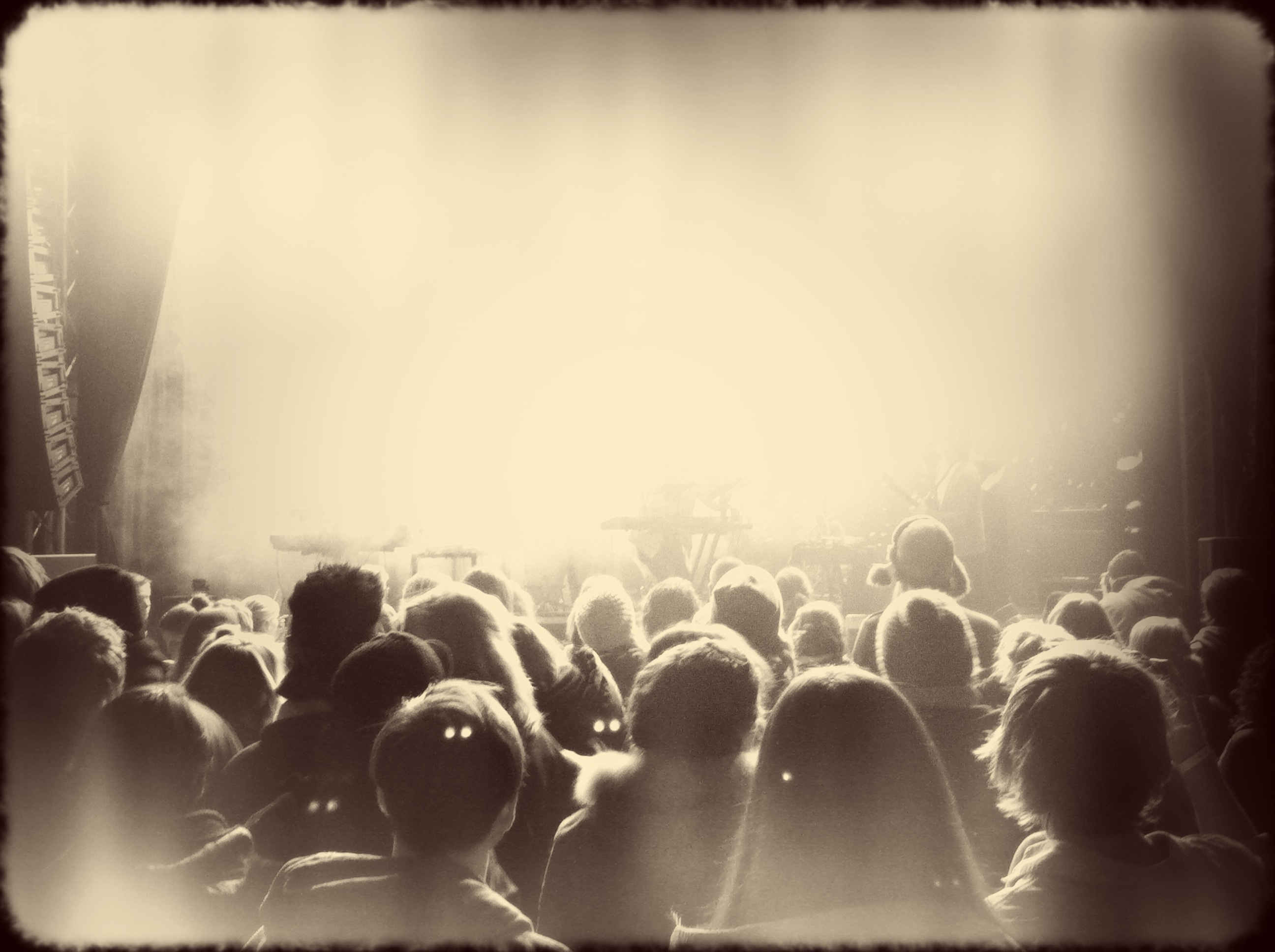 Фото с фестиваля by:Larm 2011 года.